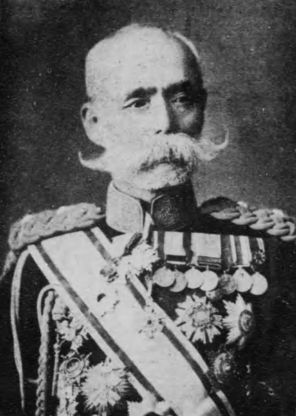 長岡外史 空中文明博覧会写真帖 渡部一英 編 (帝国飛行発行所, 1918)